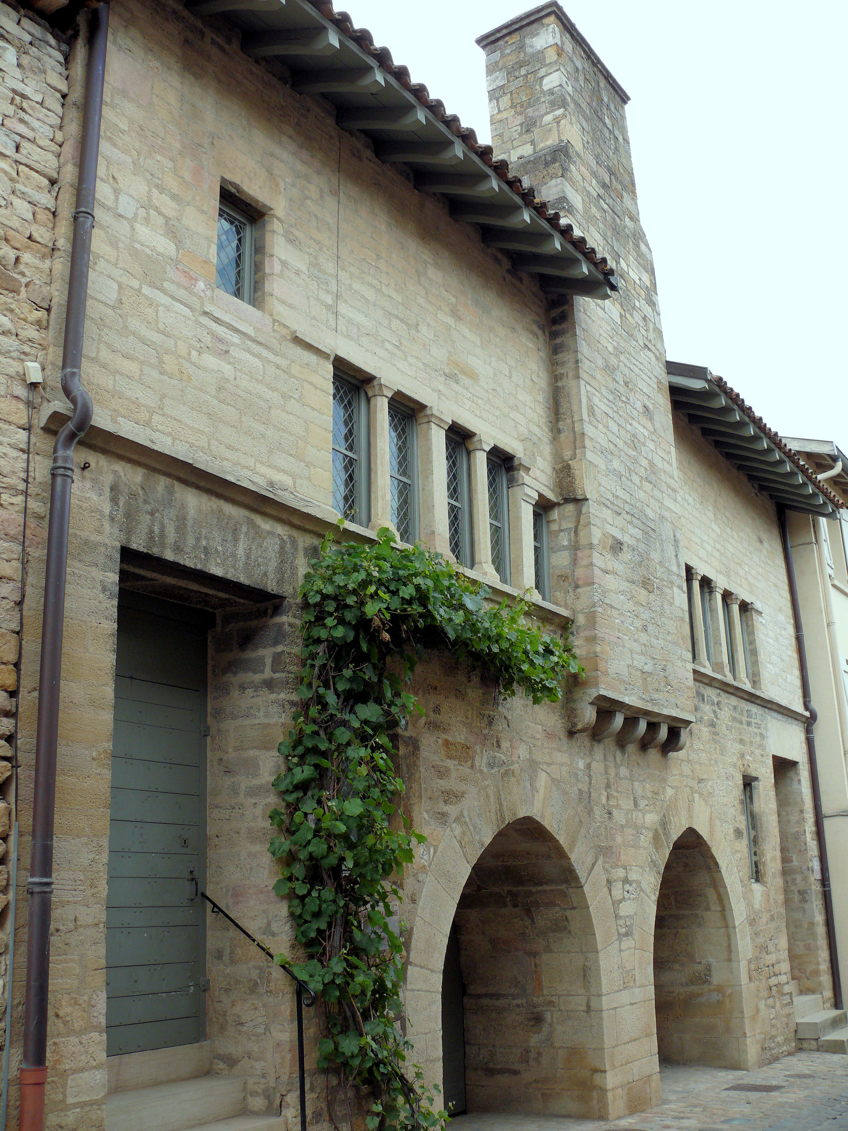 Cluny - Hôtel de la Monnaie - 6 rue d'Avri